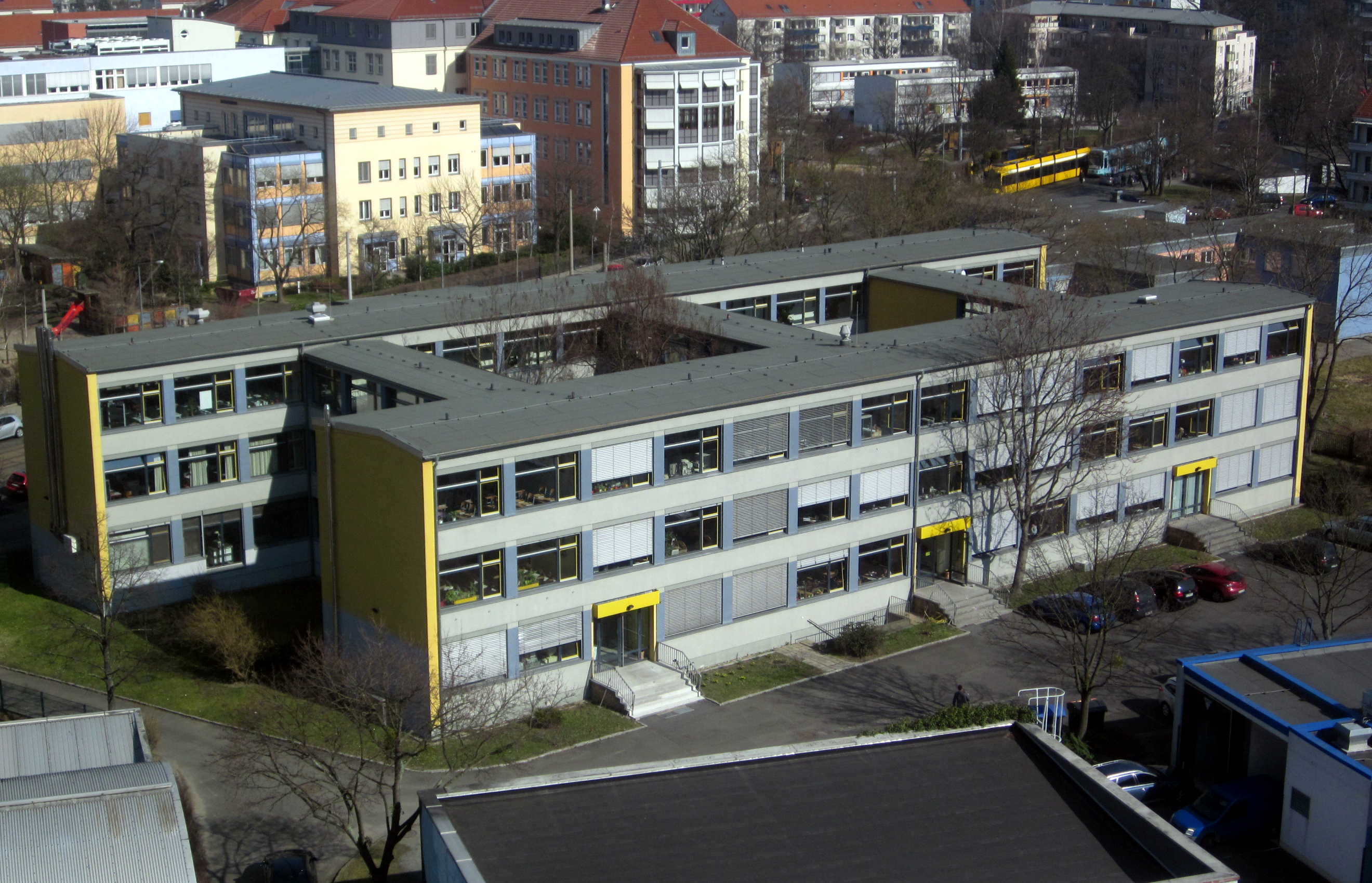 Dresden Johannstadt Berufsschule Canalettostraße